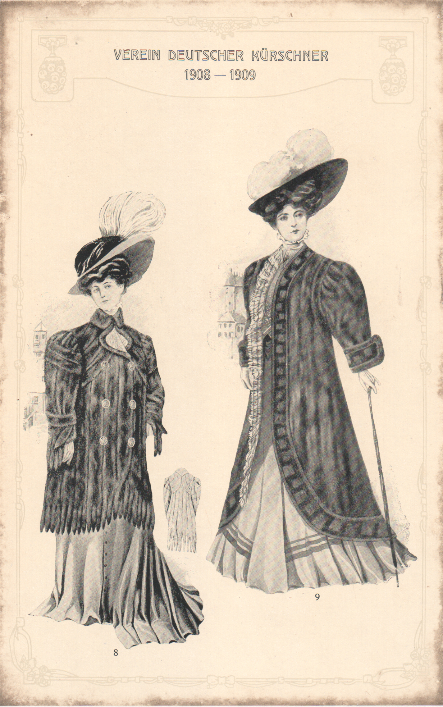 Modebilder 1908/1909 Nr. 8. Halblanger Paletot aus japan. Nerz. Von A. & S. Segall, Berlin. Nr. 9. Nerzpaletot mit Phantasieweste und Chiffongarnierung. Von E. Schmidt, Berlin.